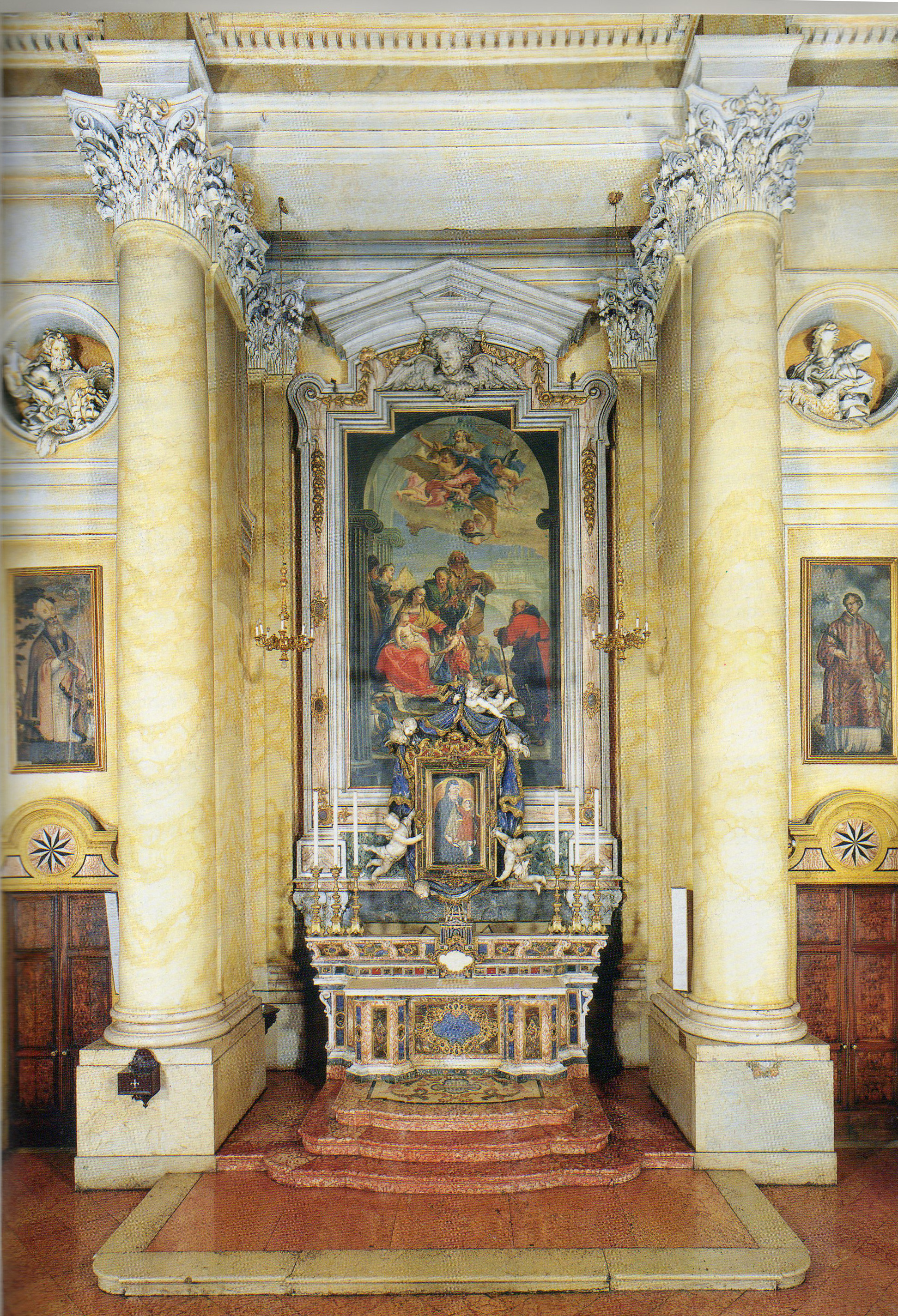 San_lorenzo_brescia_cappella_madonna_della_provvidenza.jpg